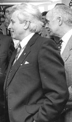 ADN-ZB Grubitzsch 15.3.87 Leipzig: Frühjahrsmesse-Buchmesse 87 Kurt Hager (M.), Mitglied des Politbüros und Sekretär des ZK der SED besuchte bei einem Rundgang der Internationalen Leipziger Buchmesse 87 im Messehaus am Markt den Stand des Aufbau Verlages. Verlagdirektor Elmar Faber (vorn r.), gab den gästen, unter ihnen Klaus Höpke (r.), Stellvertreter des Ministers für Kultur der DDR, und Hermann Kant (M.), Präsident des Schriftstellerverbandes der DDR , Erläuterungen.